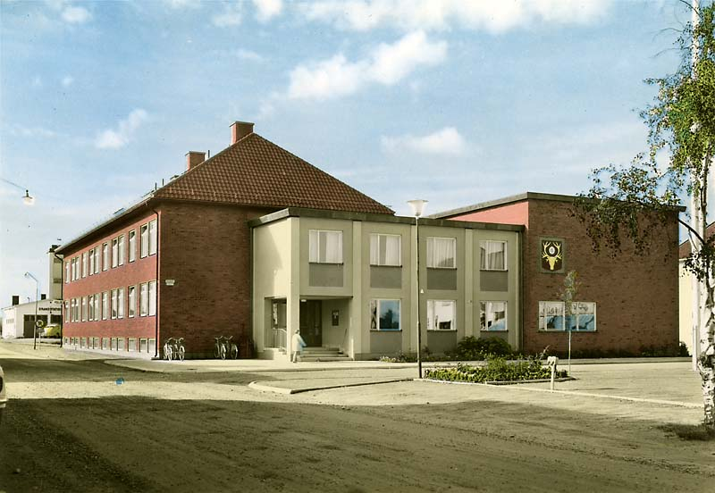 Kommunalhuset. Handkolorerad variant av ac01215.; Byggnadsverk; Kommunalhus; Offentlig förvaltning